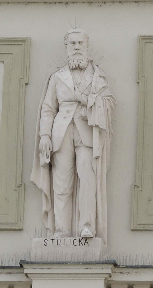 Justiční akademie, Masarykovo náměstí 183/15, Kroměříž. Ferdinand Stolička - socha na průčelí budovy.